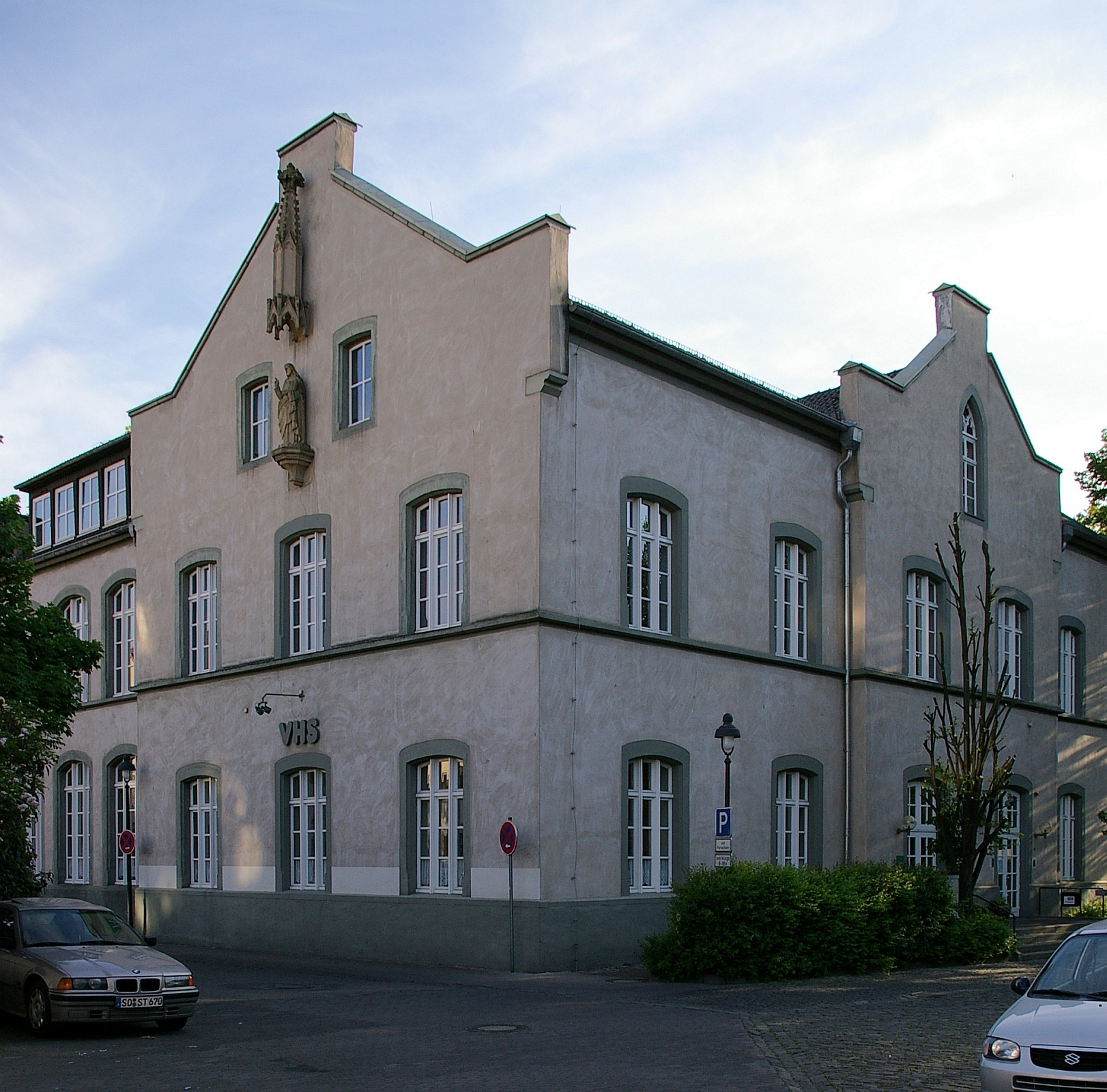 Werl This image shows a heritage building in Germany, located in the North Rhine-Westphalian city Werl (no. A 004).